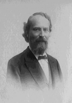 Otto Lehmann